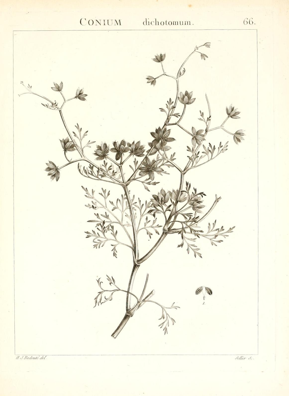 C ON lUM dicliotomiim, 66. 3.J.ReJm'^c',/,'/ Jc//iir Jl